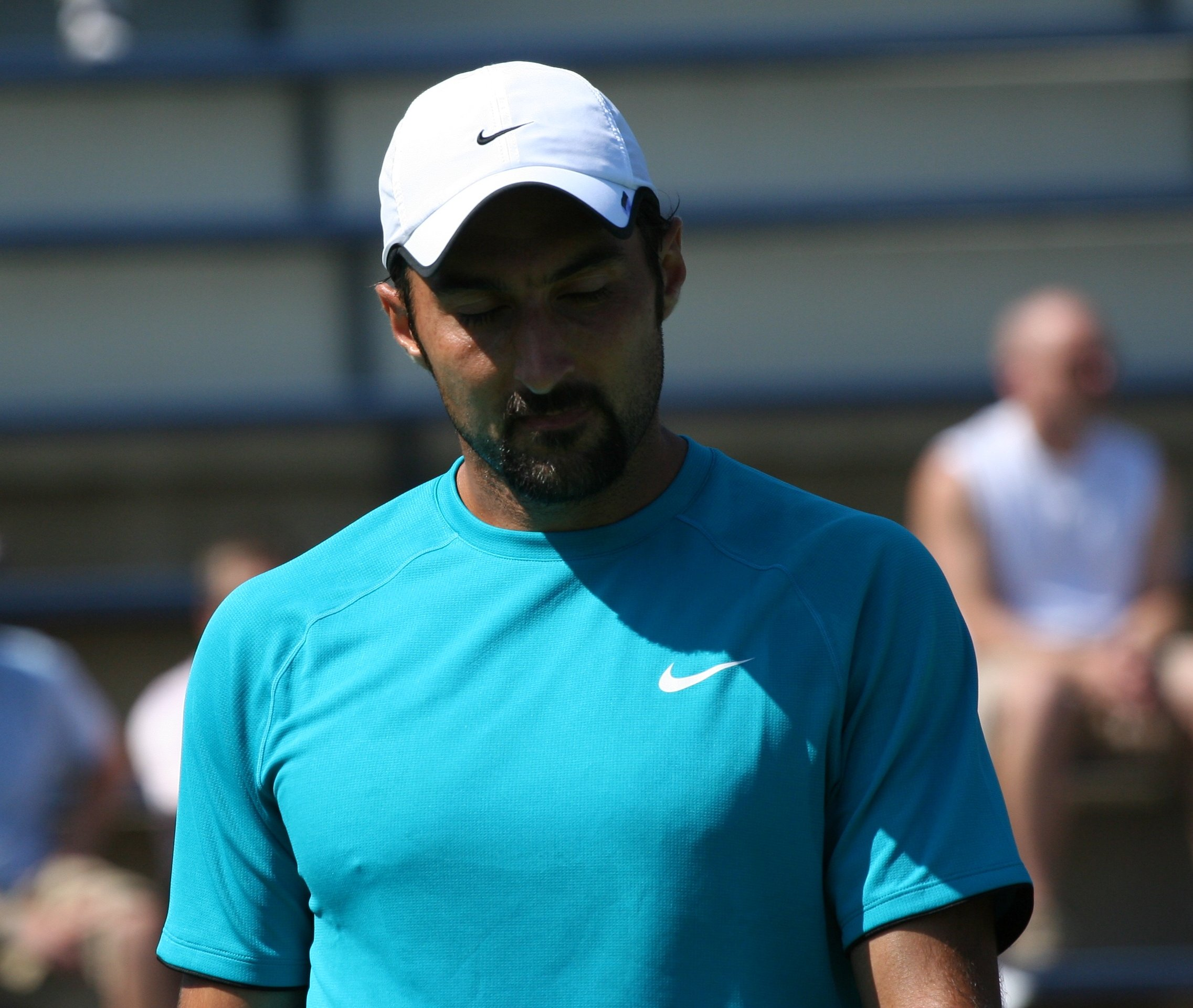 U.S. Open Saturday, Sept. 5, 2009